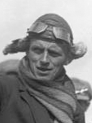 Von den grossen deutschen Herbst-Segelflügen in der Rhön in Anwesenheit des Generals v. Ludendorff, wobei ein Weltrekord von 12 km Langstreckenflug von dem bekannten Segelflieger Martens aufgestellt wurde. General v. Ludendorff im Gespräch mit dem Rekordflieger Martens.